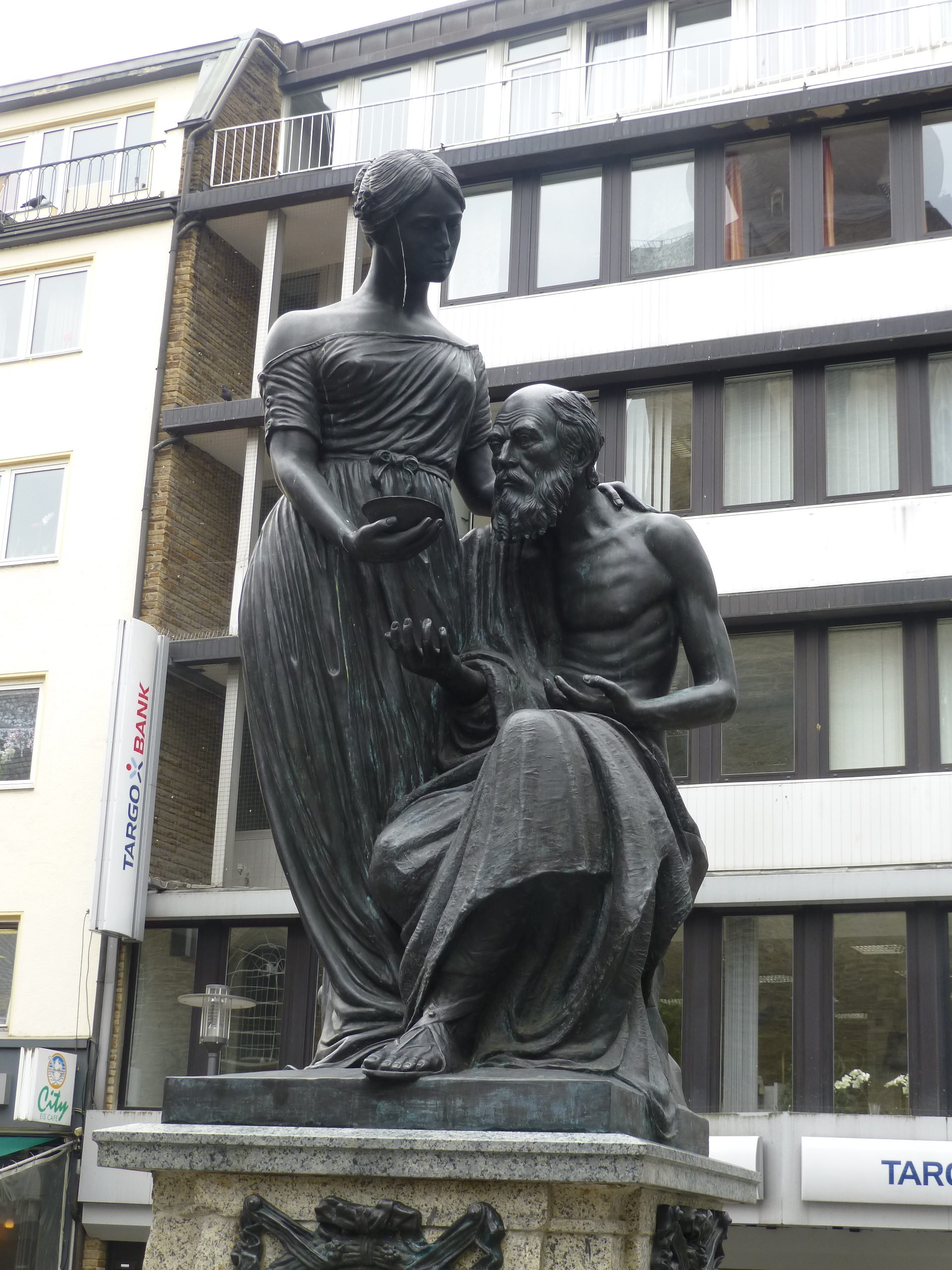 Calvinstraße, Wuppertal